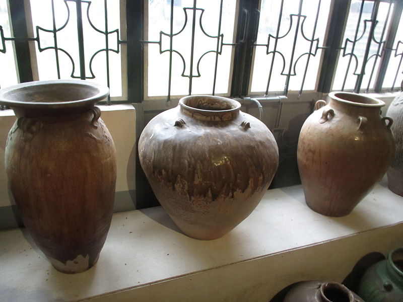 Bikol Central: Mga dulay kaagan restos